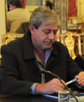 Eduardo Buzzi. Federación Agraria Argentina. En entrevista con el gobierno durante el paro patronal agropecuario de 2008. Argentina